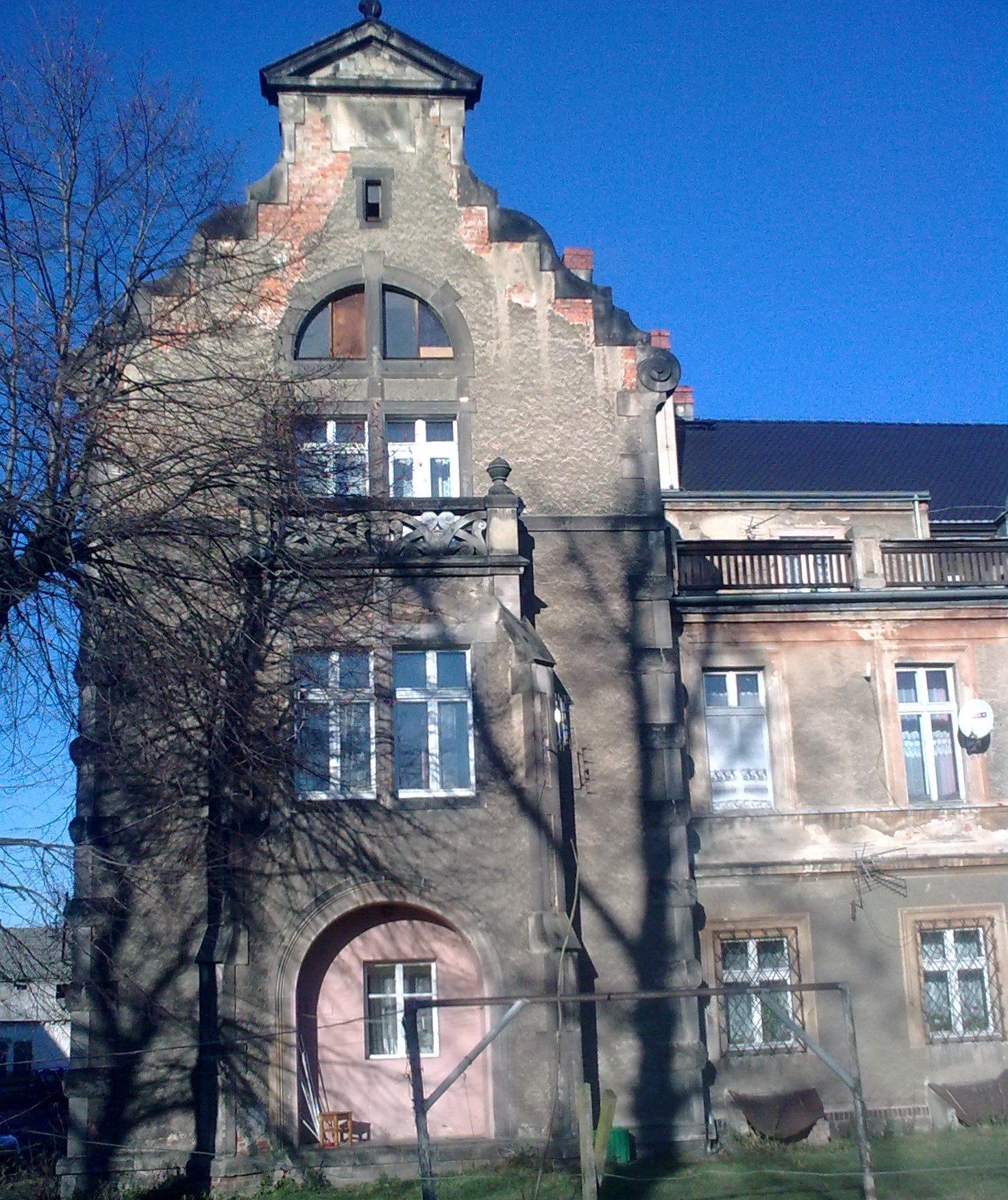 Pałac w Wiśniowej